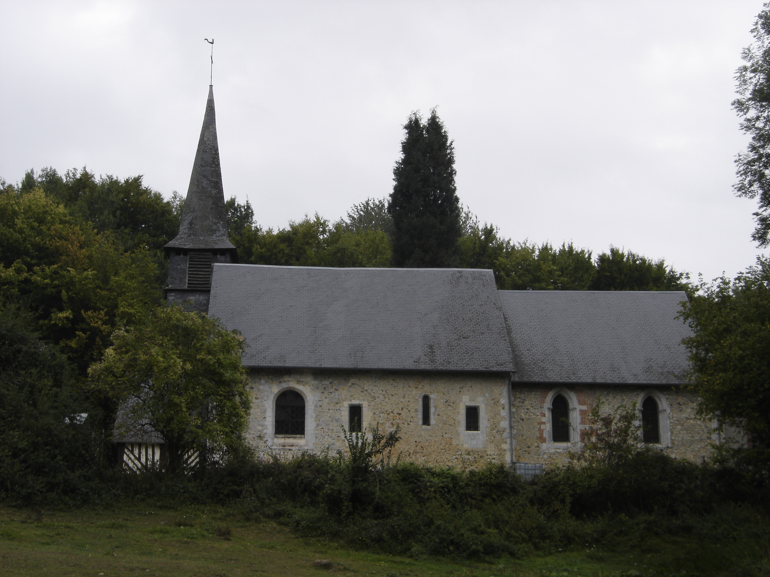 église paroissiale de la Poterie Mathieu